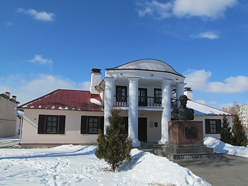 Ваўкавыск. Дом Баграціёна